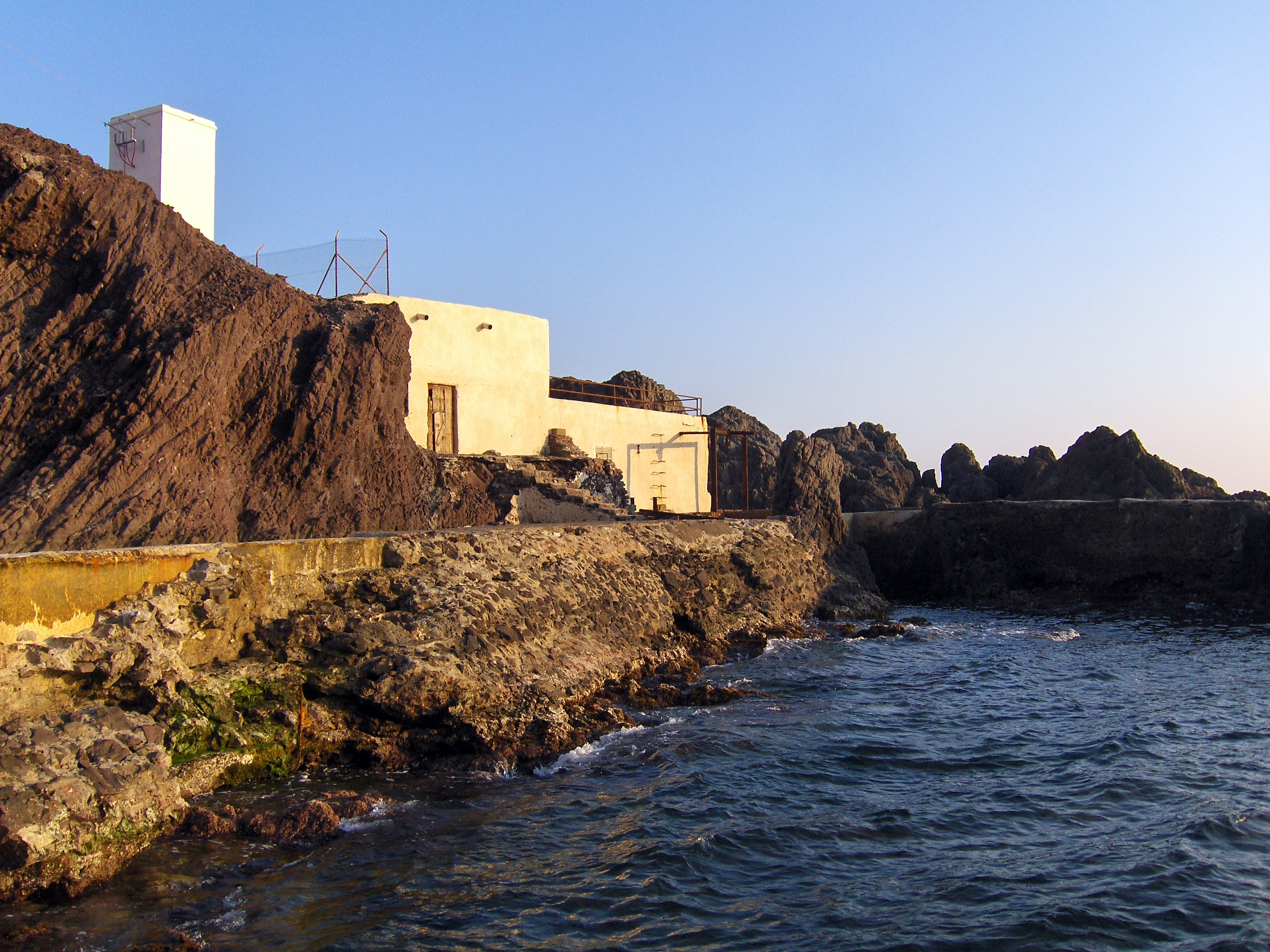 Edificio de la toma de agua de las salinas del Cabo de Gata, hoy abandonadas.